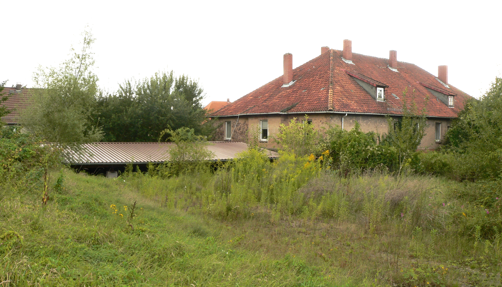 Altes Brennhaus in Fürstenberg, Rückseite mit Ausgrabungsstelle (Blechdach)